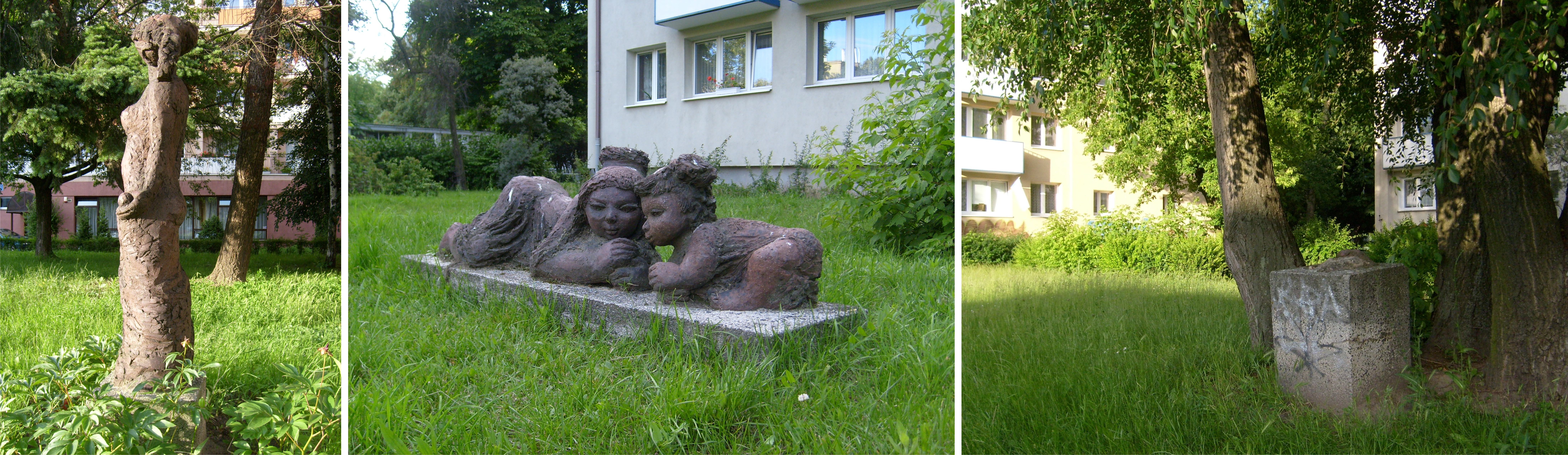 Trzy rzeźby na osiedlu Raszyn w Poznaniu.